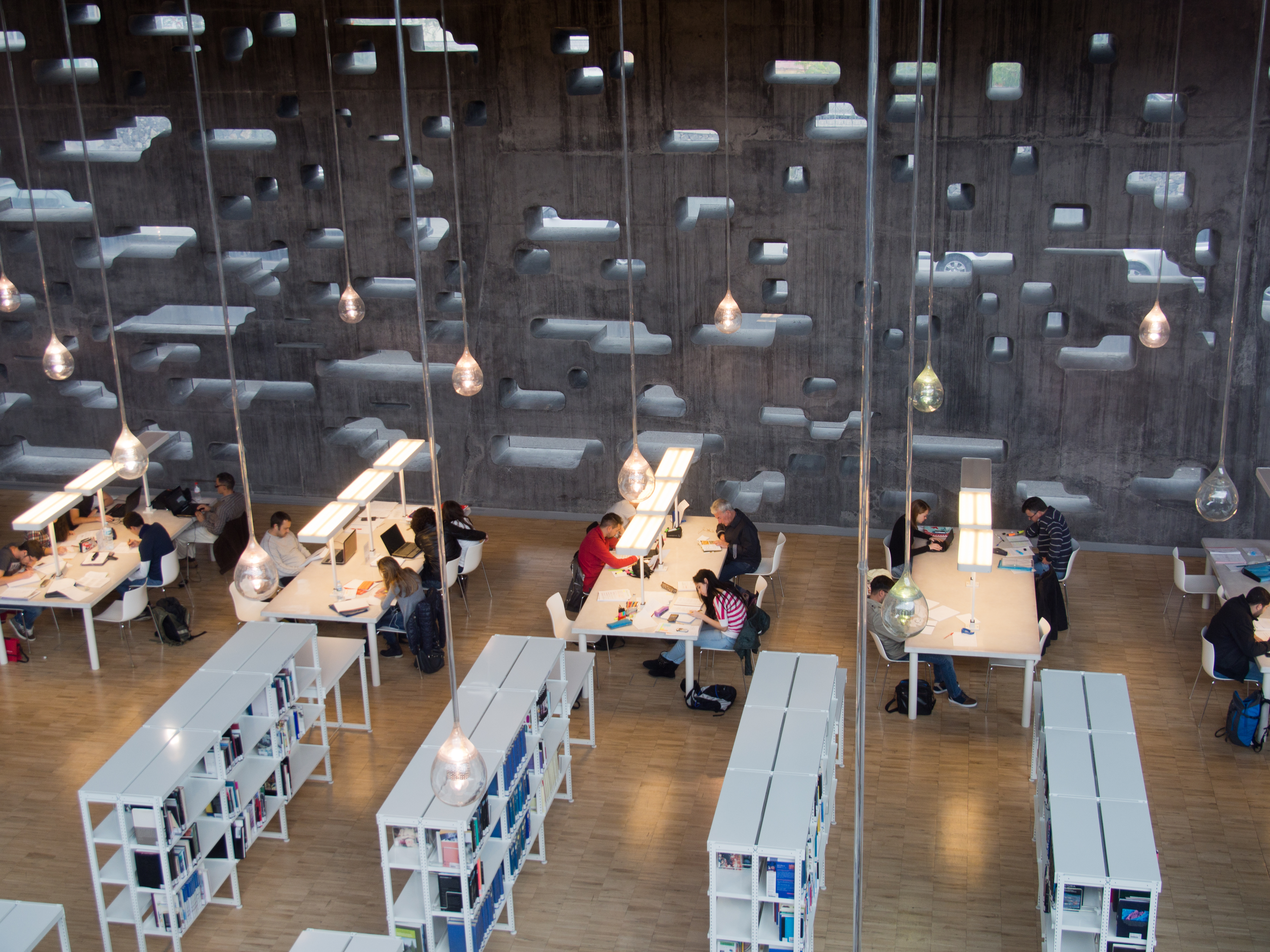 Die Bibliothek und der Leseraum im Tenerife Espacio de las Artes